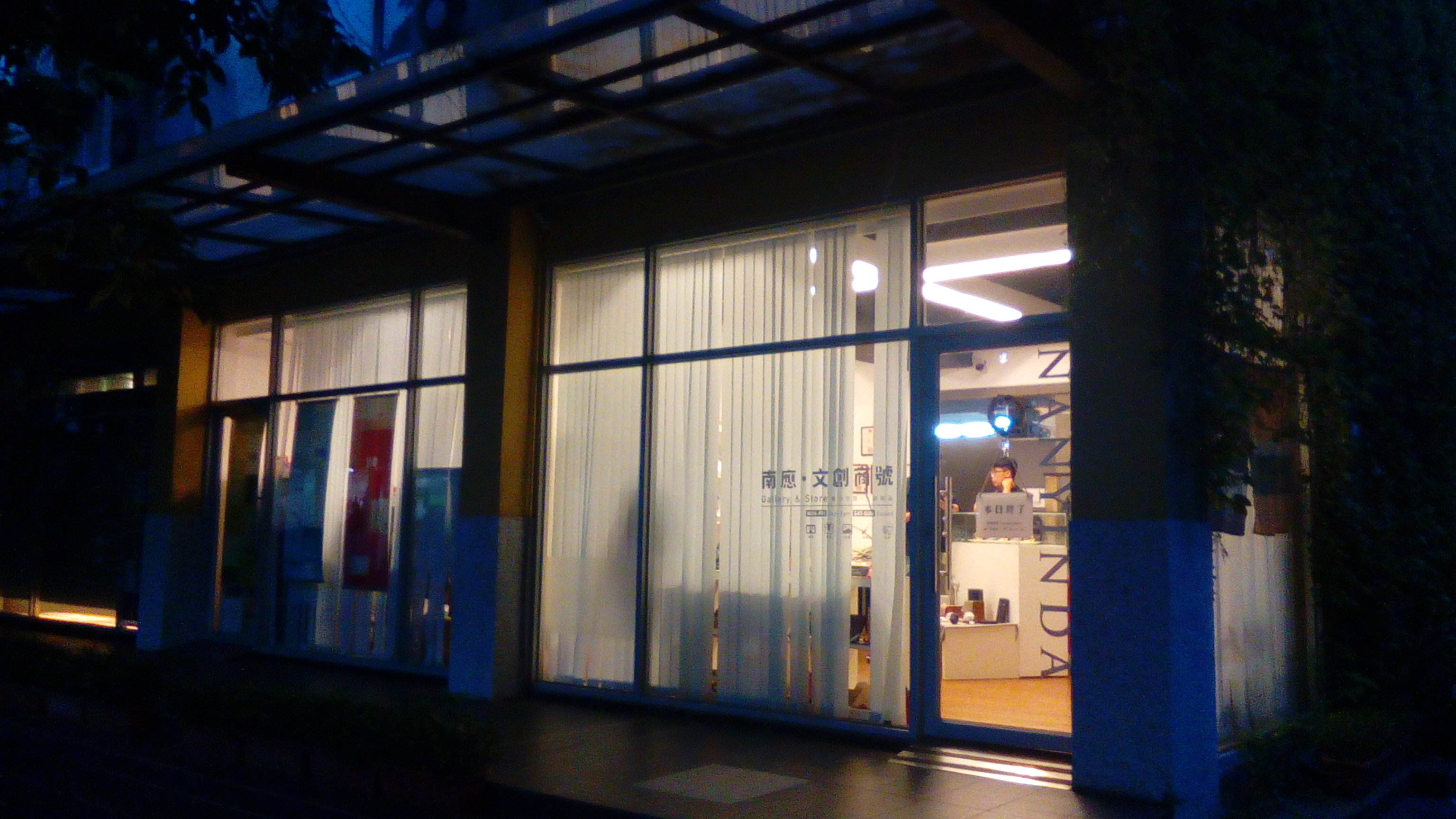 販售校內學生設計的作品